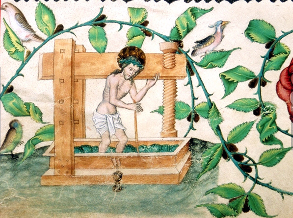 Christus in der Kelter; in: Kuttenberger Kantionale; Wien, Österreichische Nationalbibliothek, Musiksammlung; Mus. Hs. 15501; fol. 86v